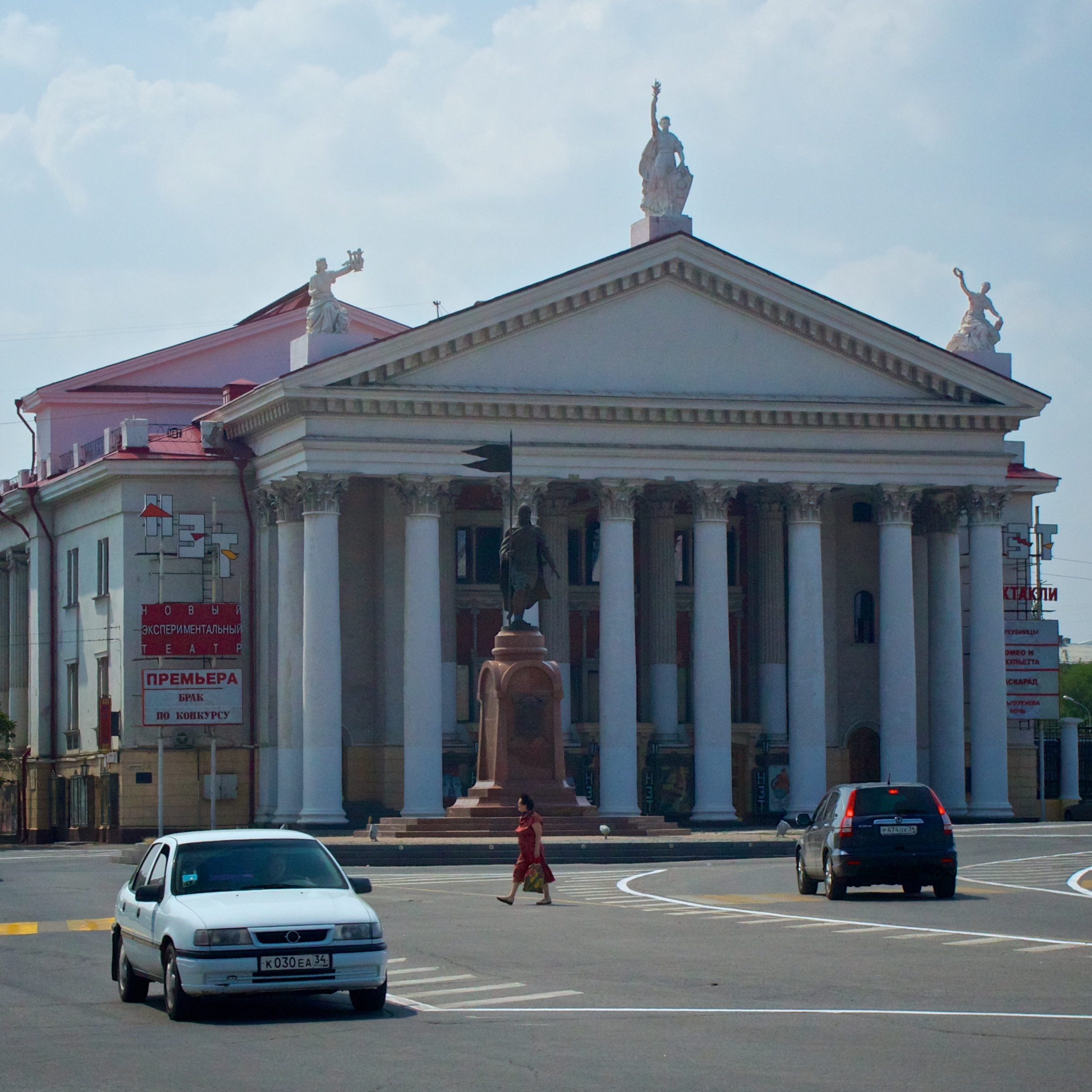 Новый экспериментальный театр и памятник Александру Невскому в Волгограде